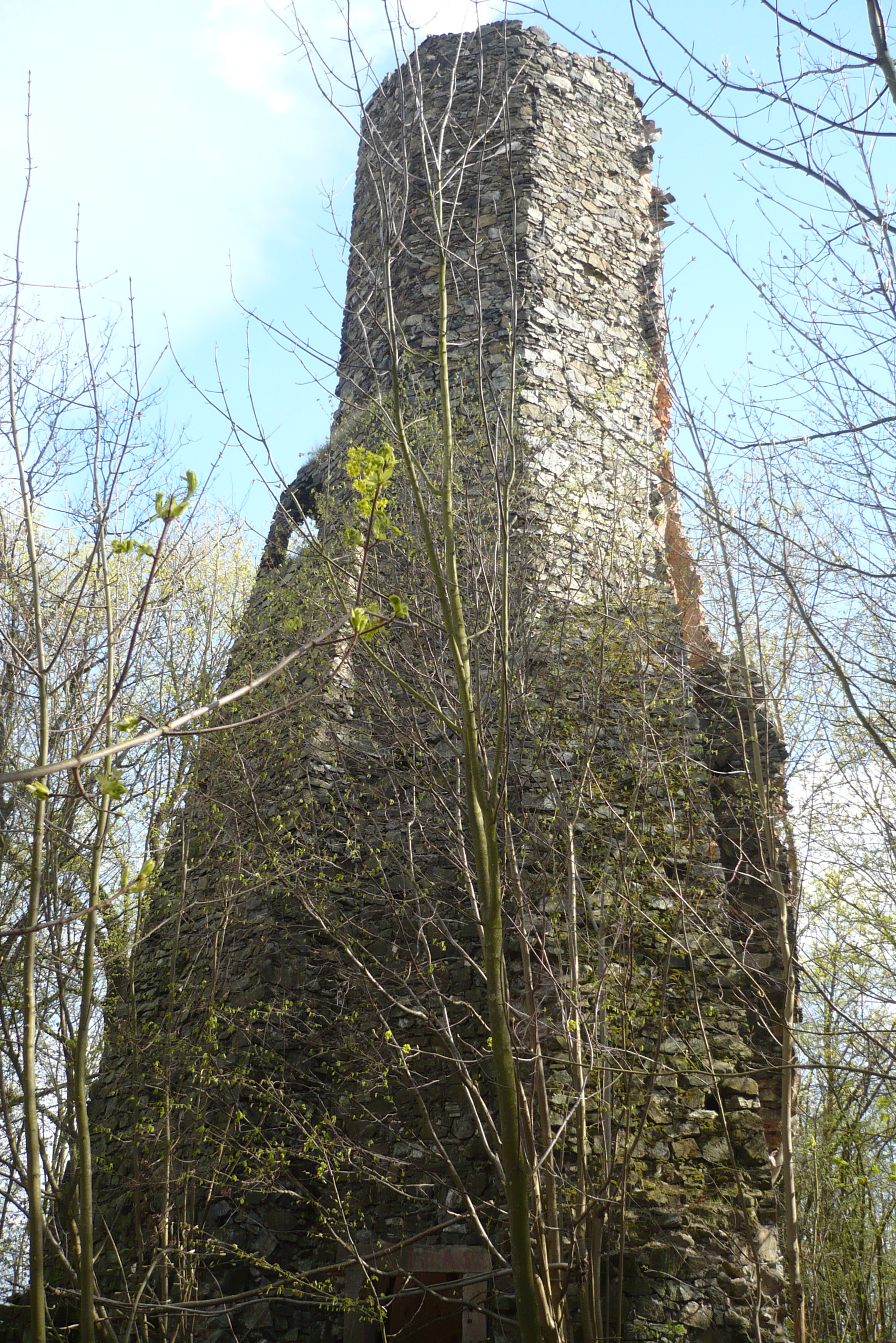 Wieża na Grodziszczu